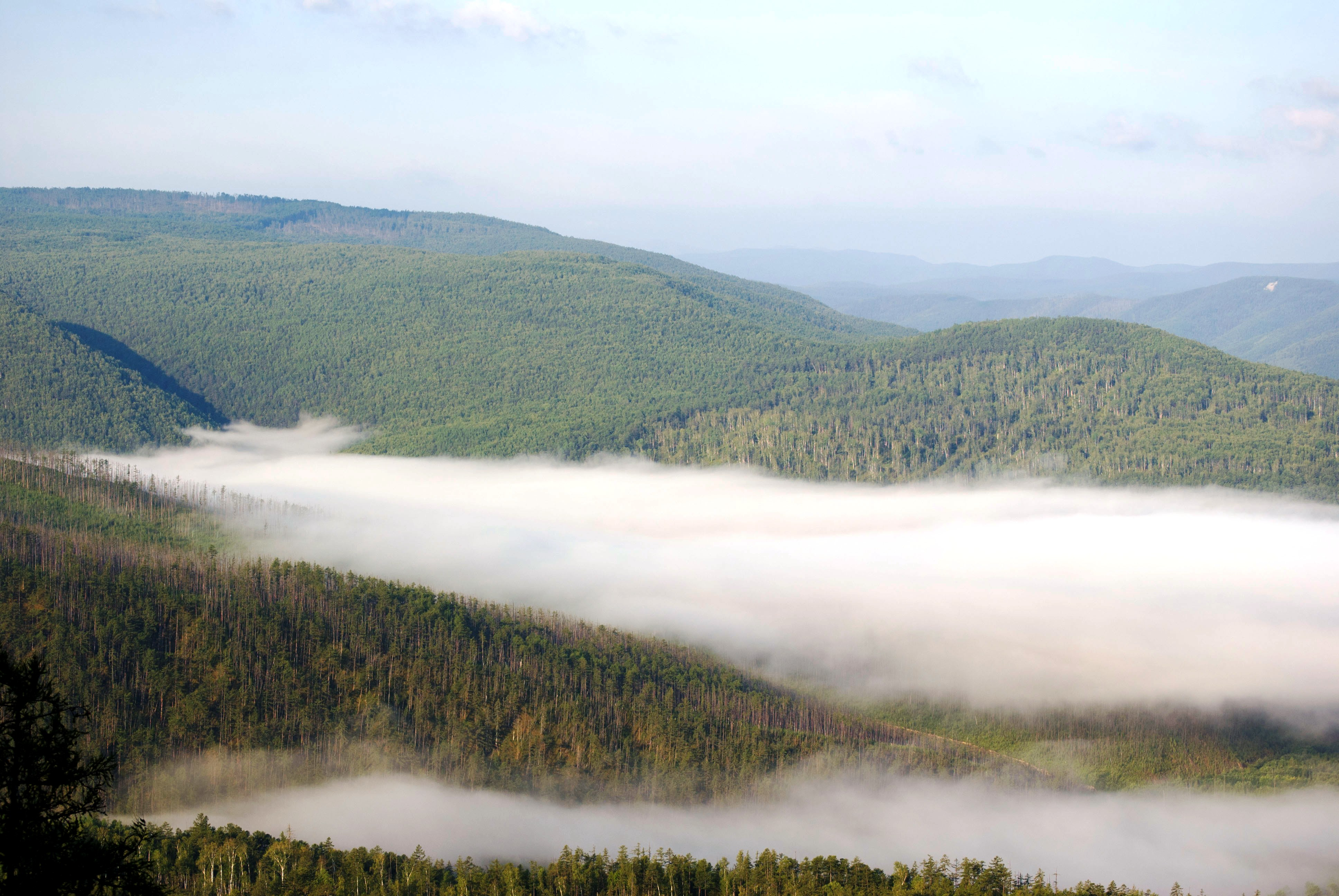 Туман в горах